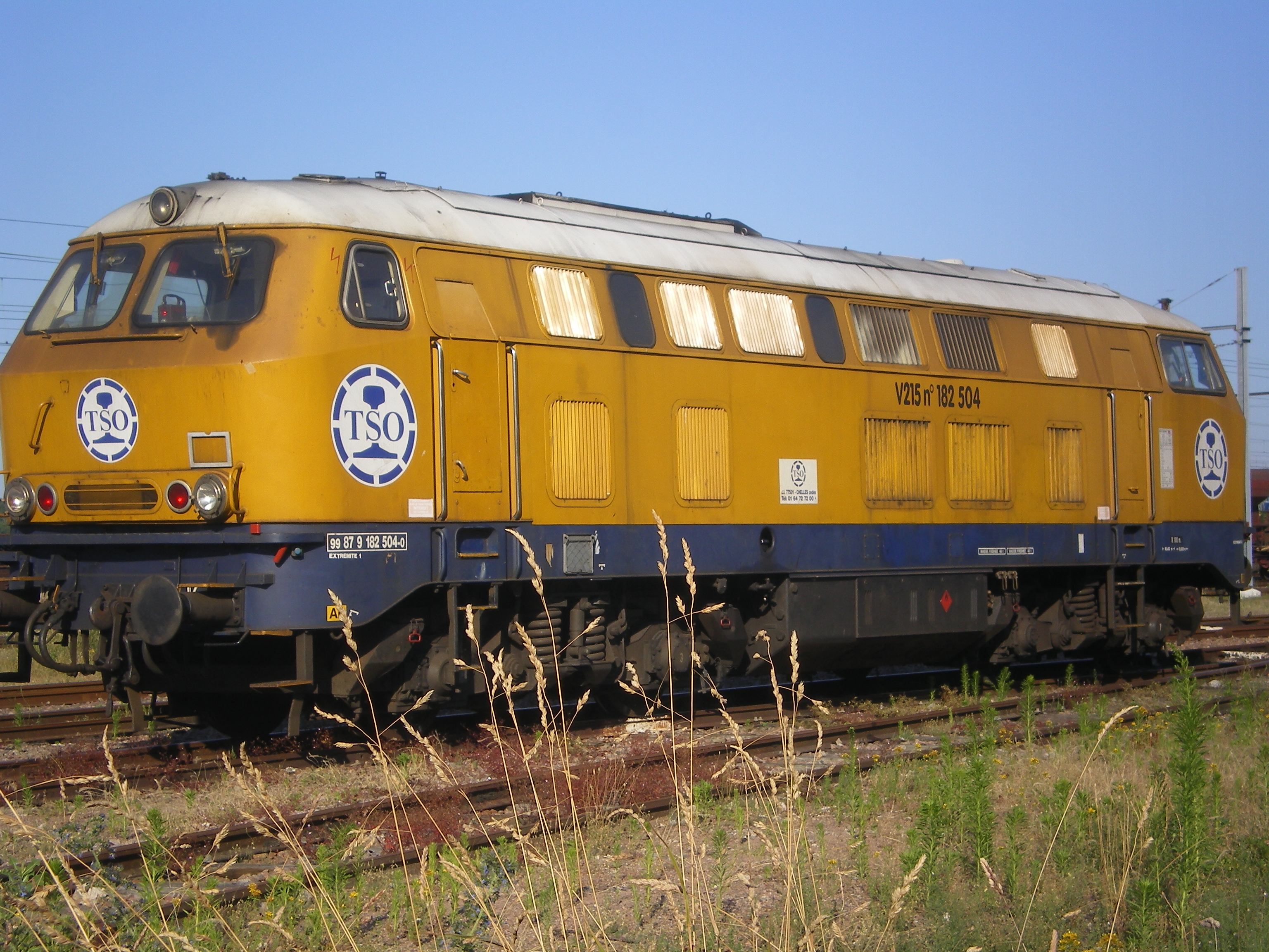 Locomotive de la société ferroviaire TSO